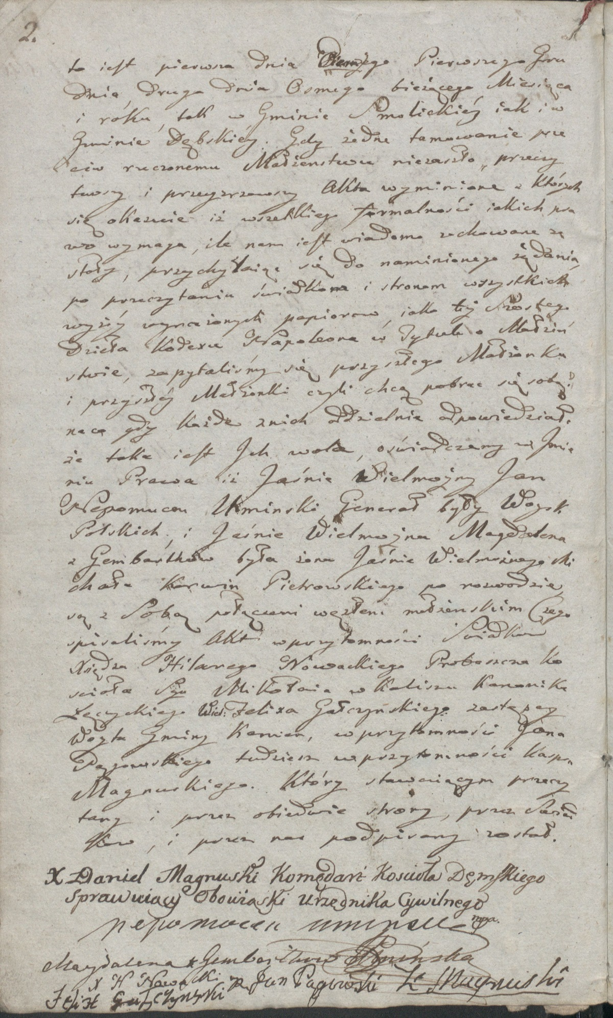 numer 1, strona 2